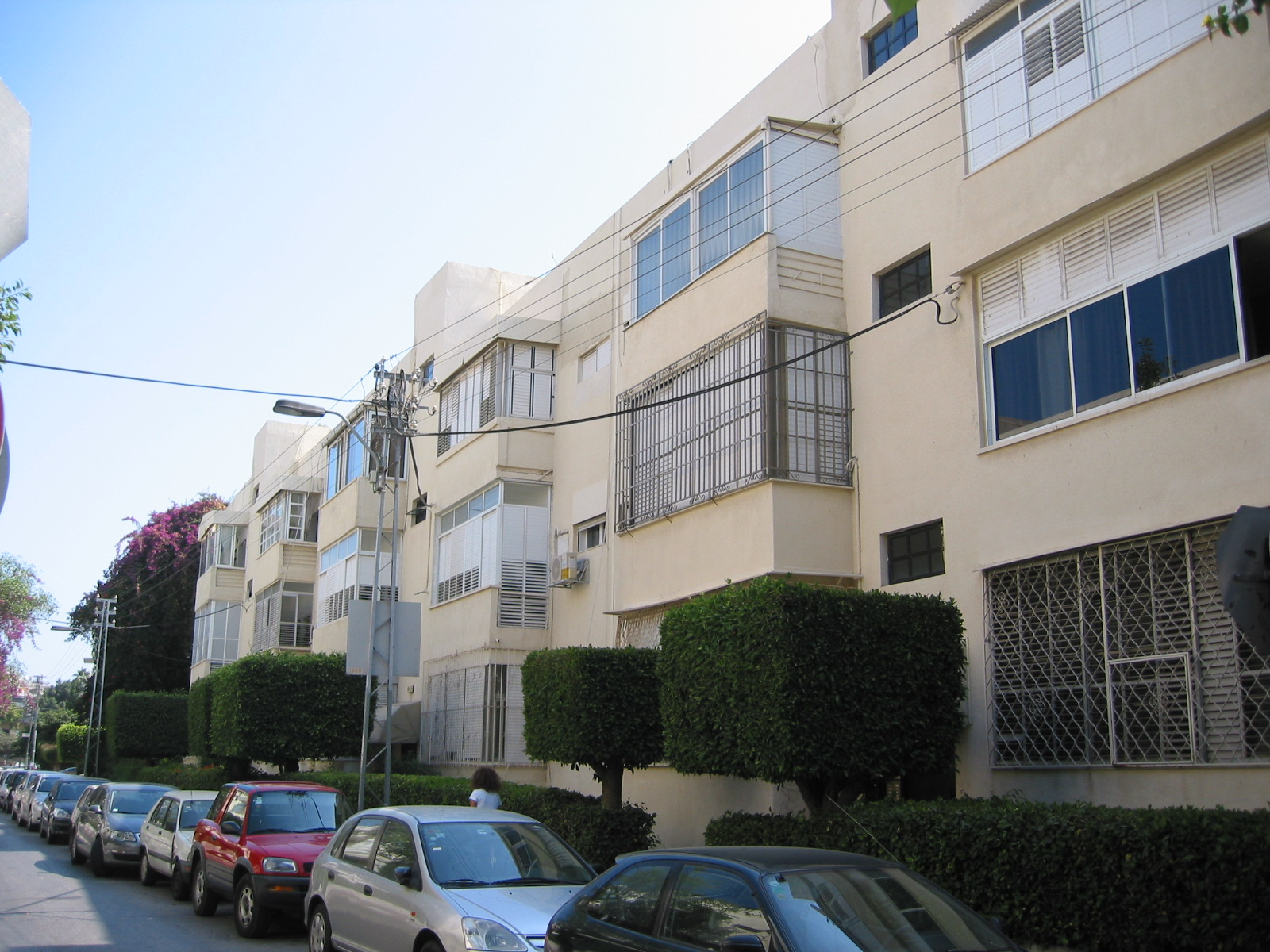 Housing in Frug Street, Tel Aviv. מעונות העובדים בפינת הרחובות פרישמן ופרוג